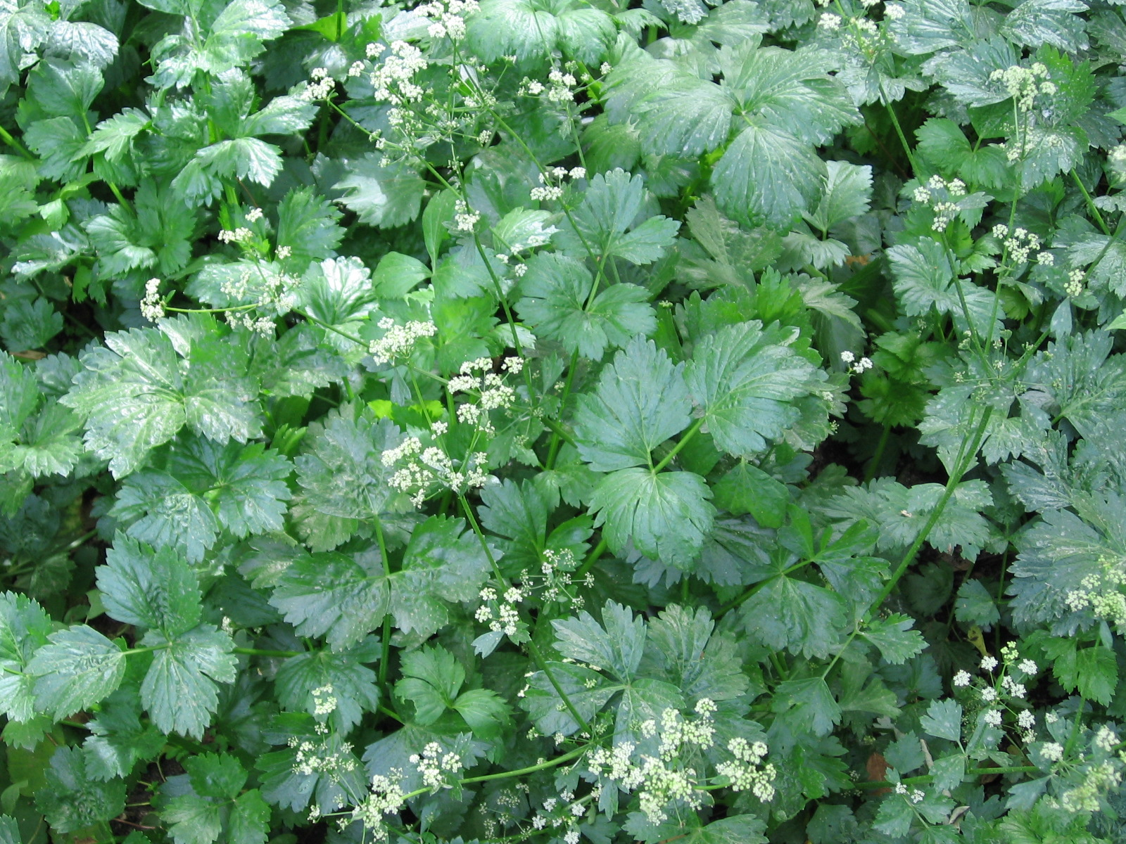 Apium graveolens. Foto tomada en el Real Jardín Botánico de Madrid.